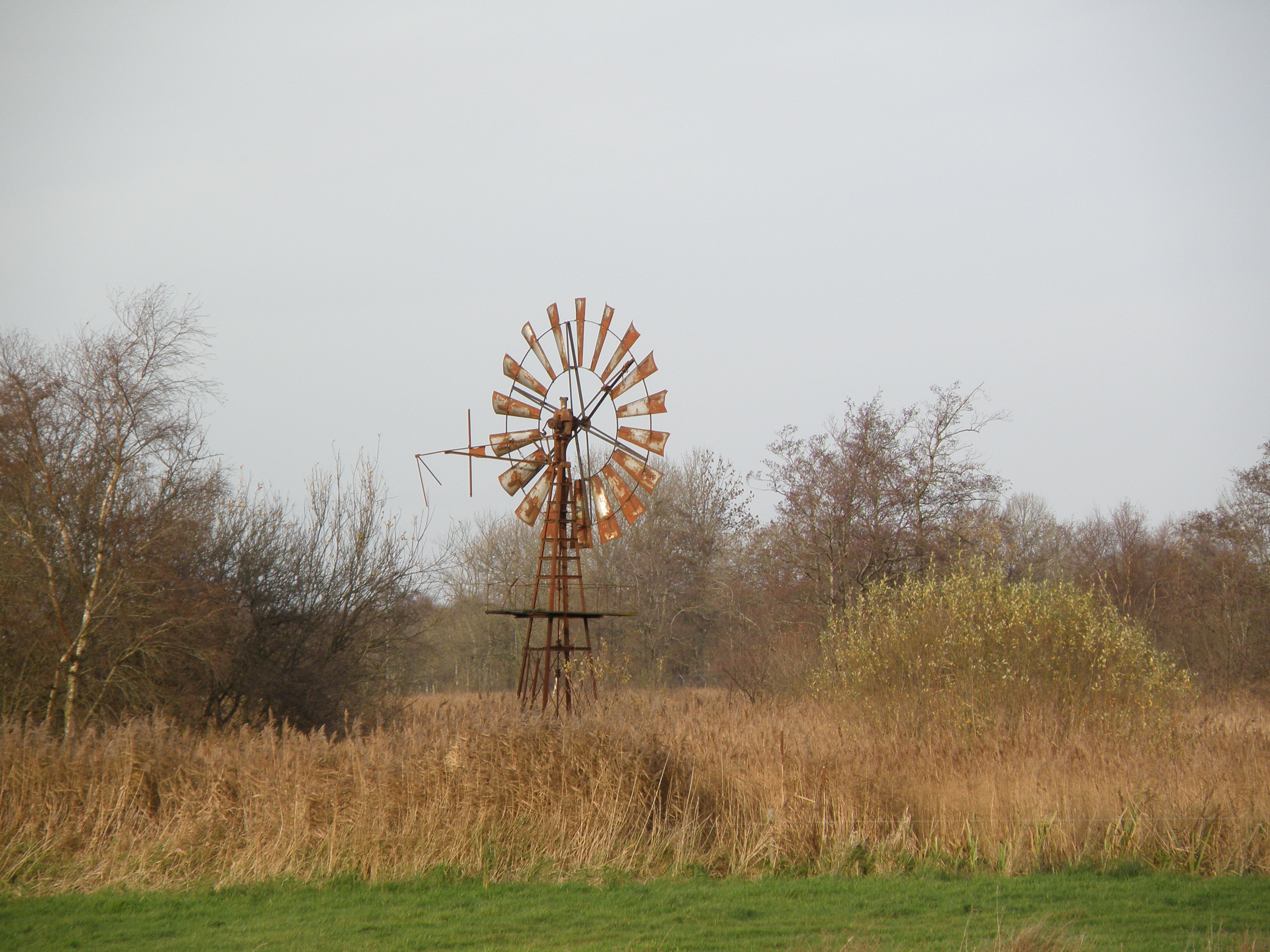 Eernewoude Windmotor Mindertsfean